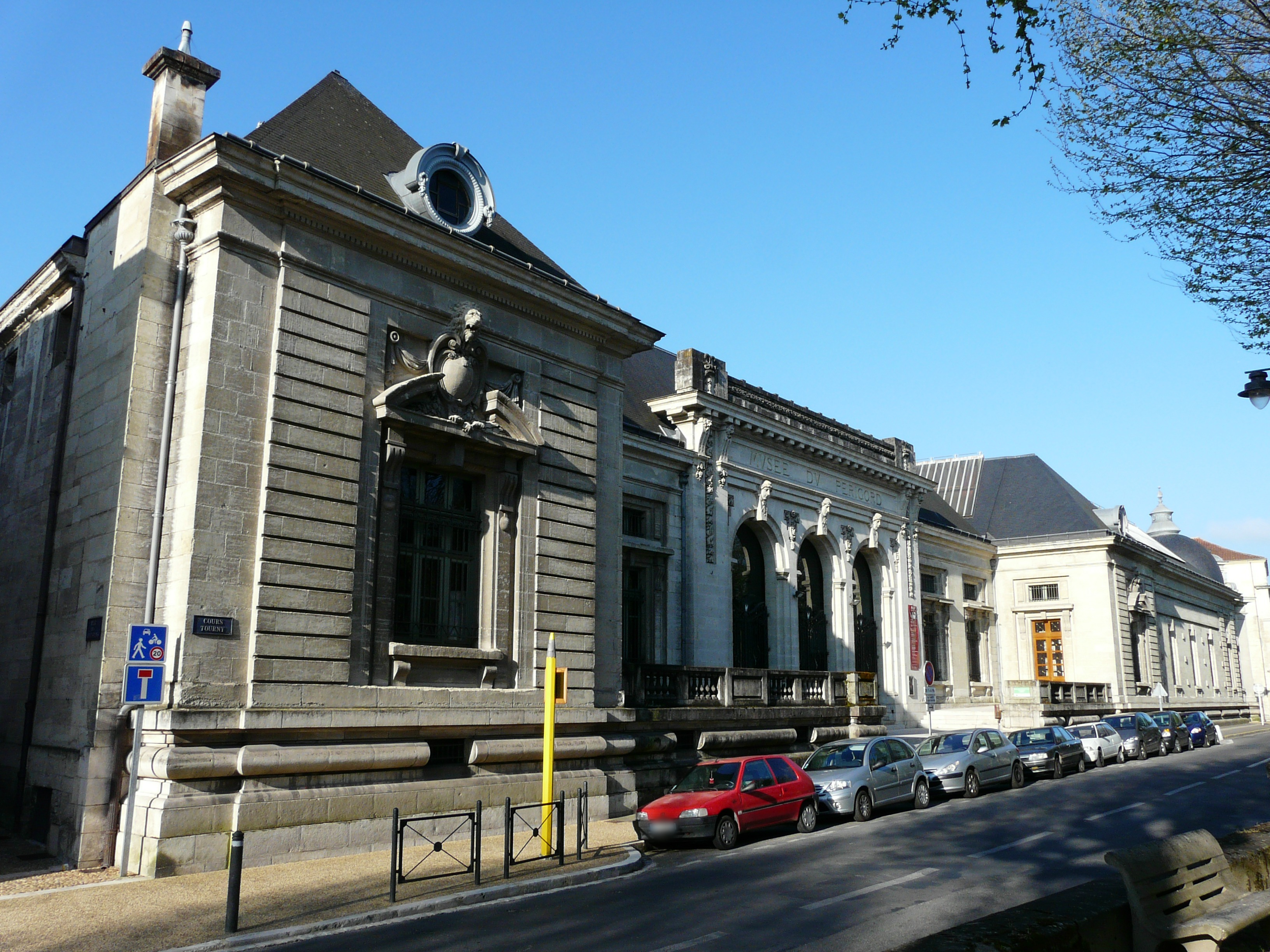 Le musée d'art et d'archéologie du Périgord, cours Tourny, Périgueux, Dordogne, France.